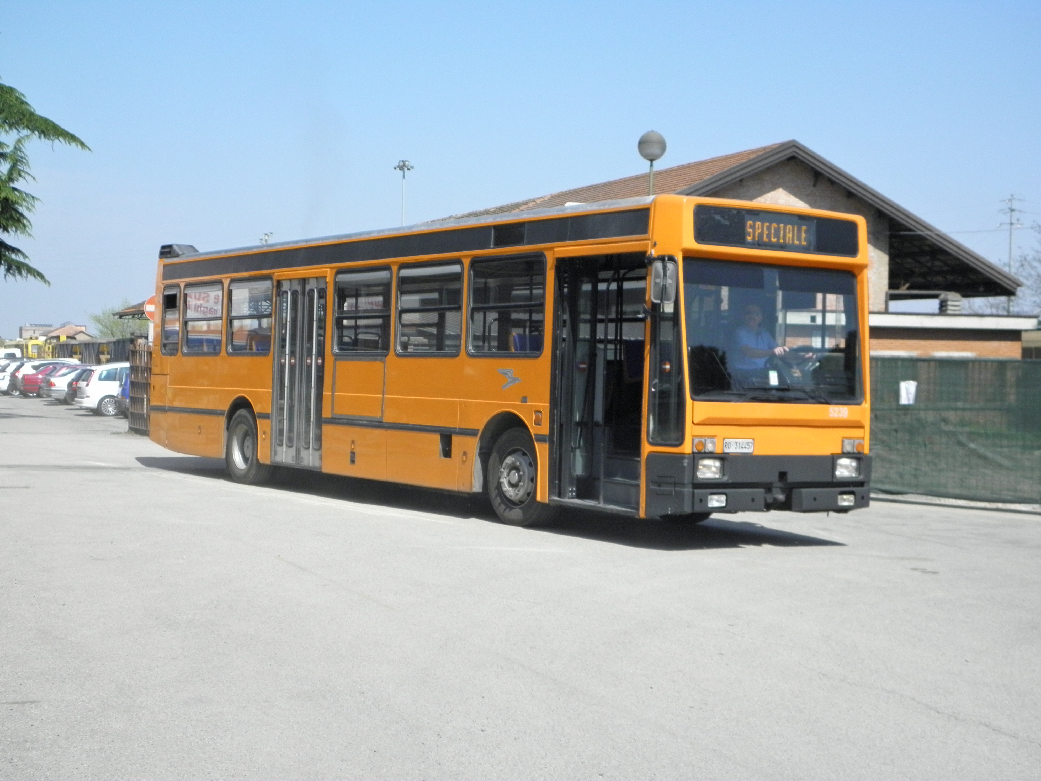 Rovigo, Piazza della Riconoscenza: un Menarini Monocar 201 della compagnia di trasporti SITA lascia il parcheggio interno della stazione ferroviaria.